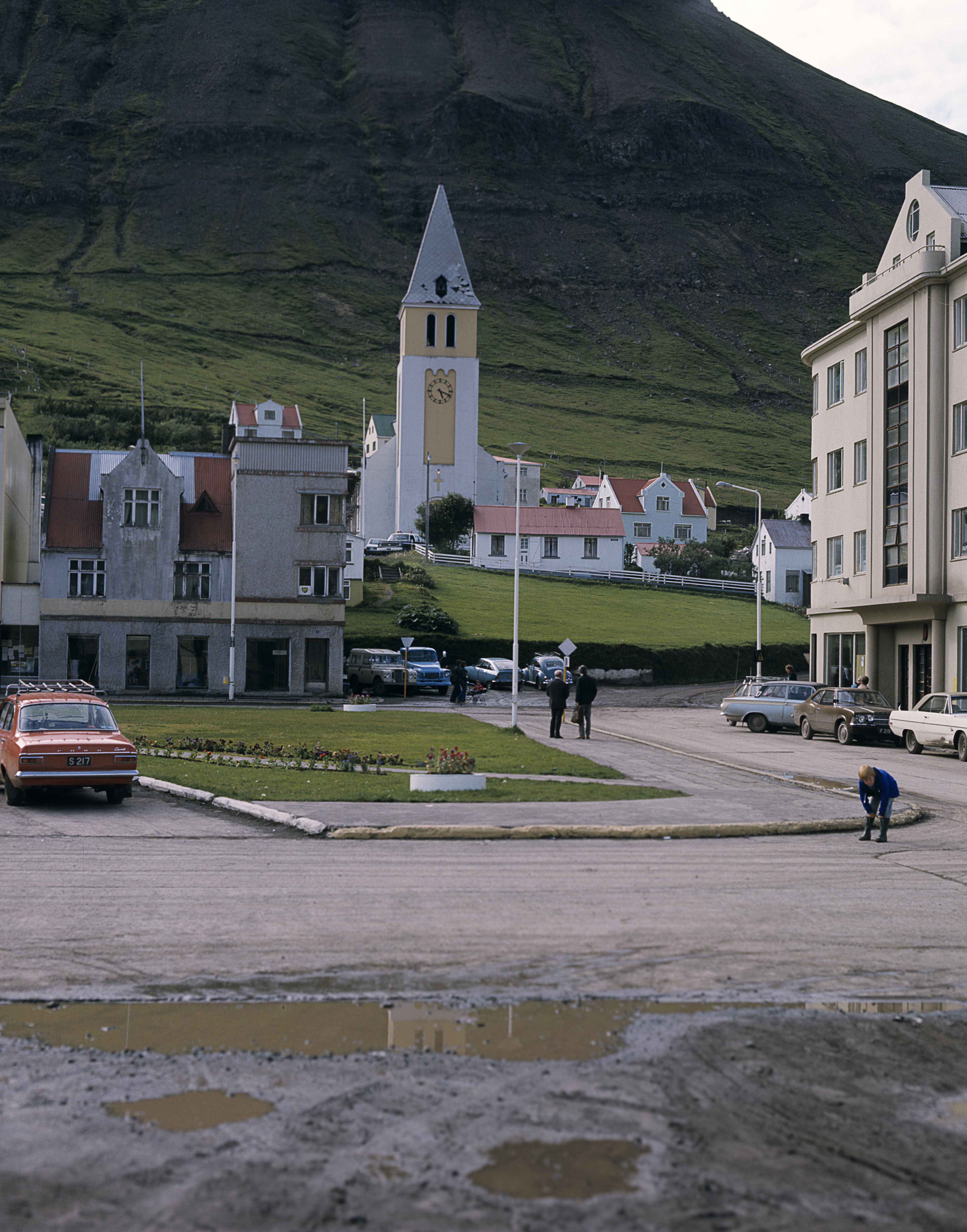 Siglufjörður, Kirche